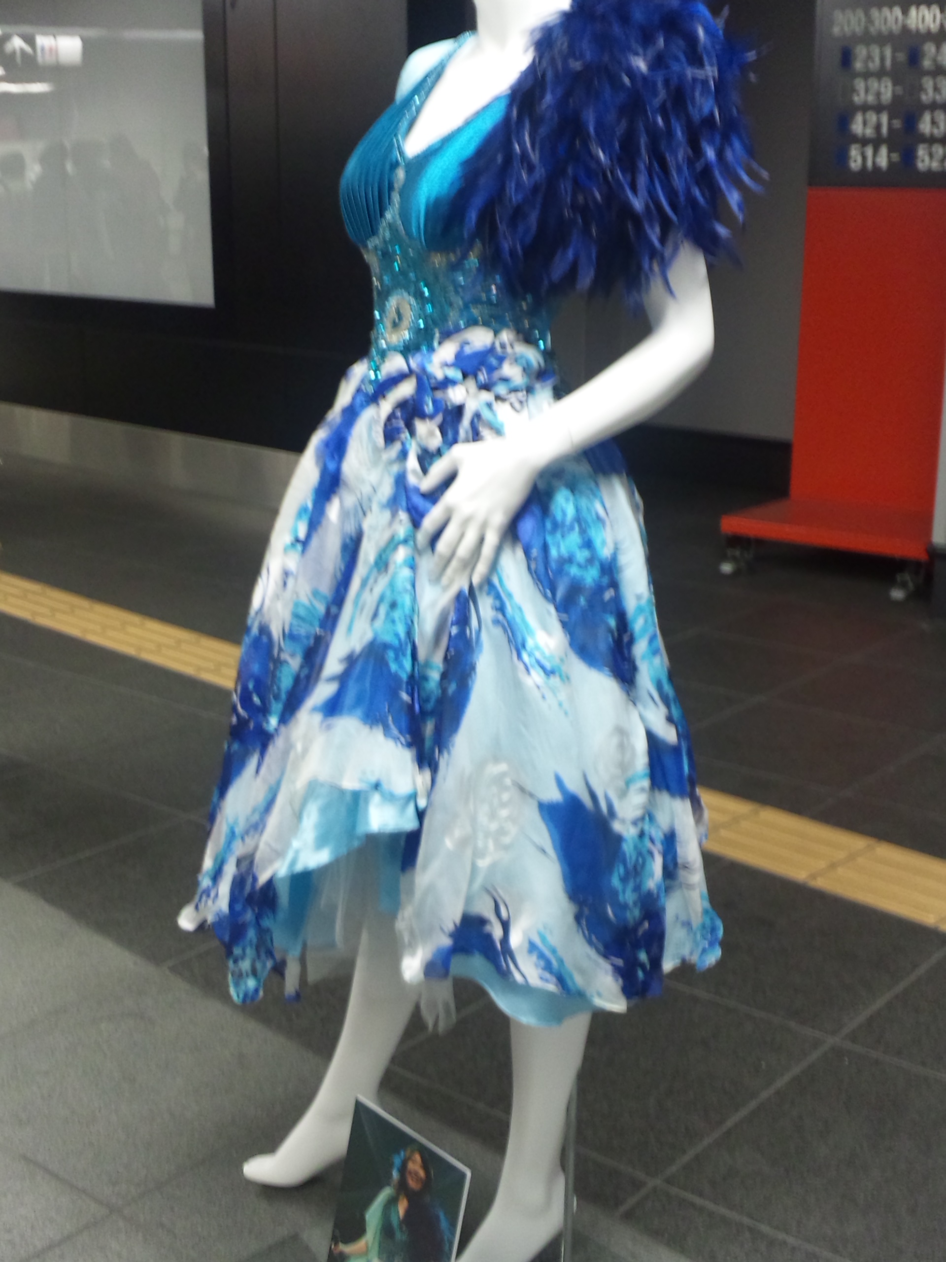 アニメロミックス Presents Minori Chihara Birthday Live 2012 supported by JOYSOUND 衣装展覧会より 『Minori Chihara 1st Live Tour 2008 〜Contact〜』の衣装。